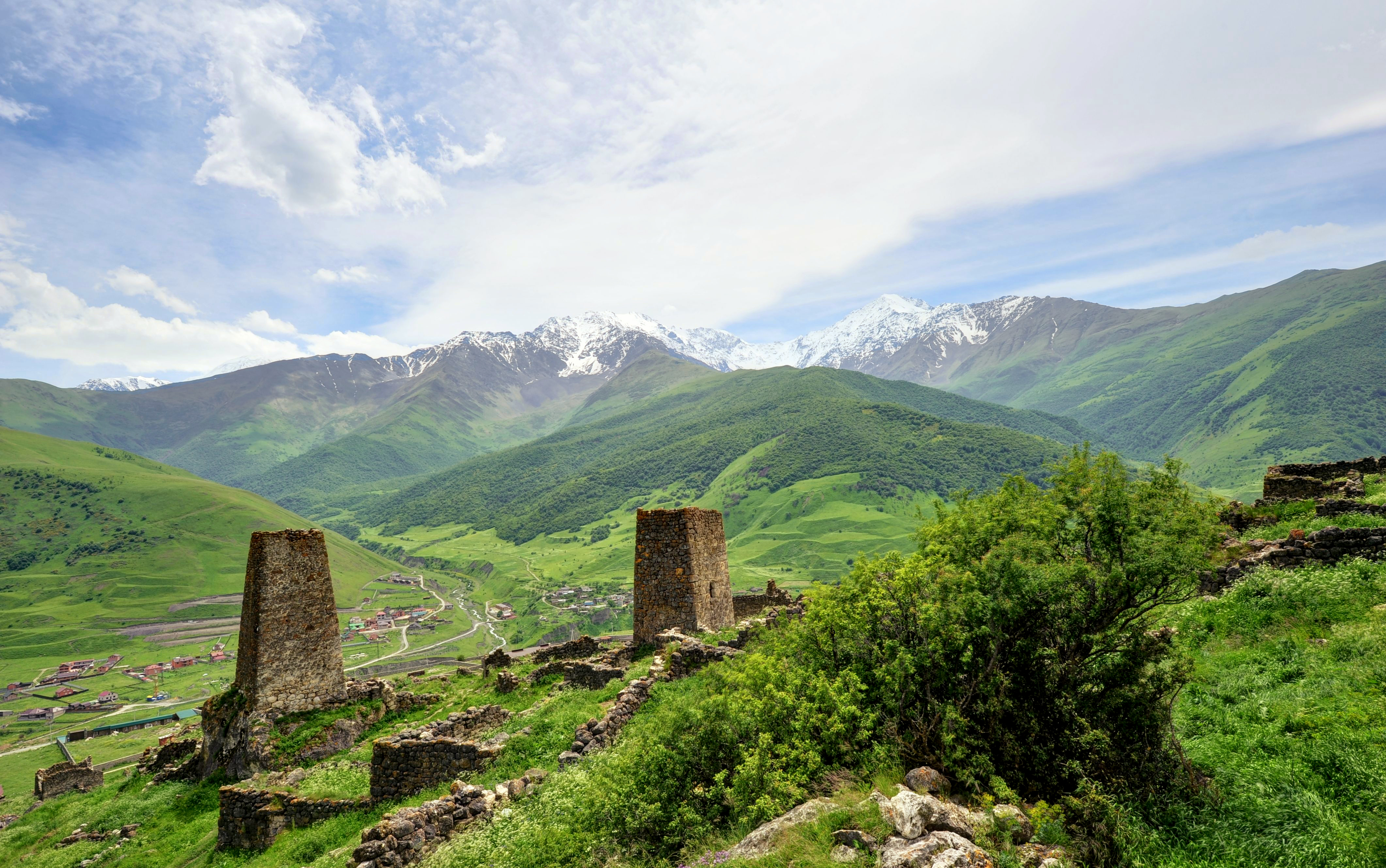 Куртатинское ущелье: Вид на селения Лац и Верхний Фиагдон This image is related to the protected area of Russia number 1510047